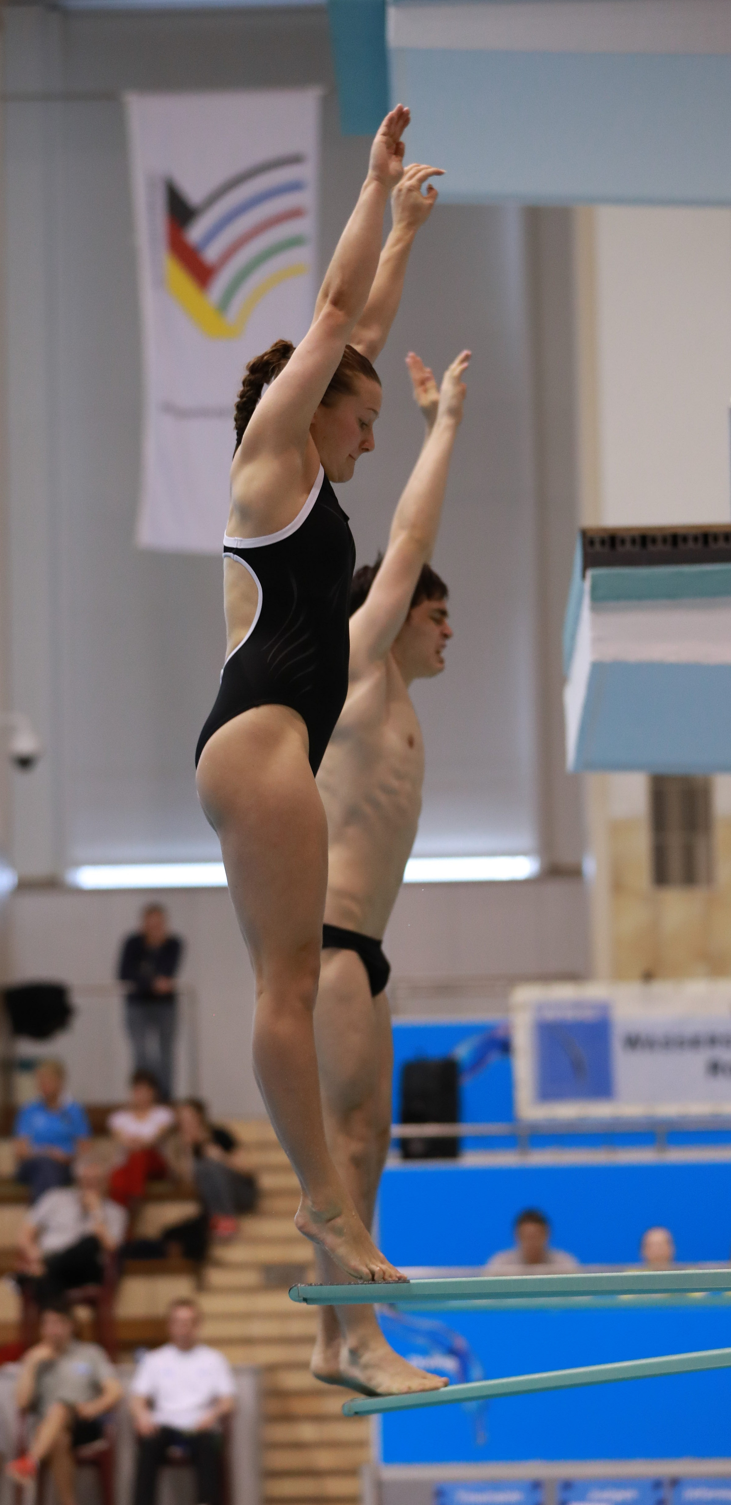 3m mixed Synchron Finale Sprung 1 bei den Internationalen Deutschen Hallenmeisterschaften im Wasserspringen Offene Klassen und Junioren. Abgebildet: Tina Punzel. Lou Massenberg.